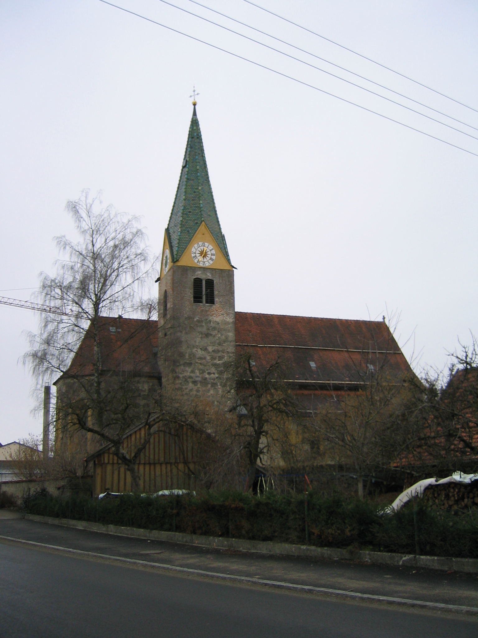 Kirche in Woringen selbst fotografiert am 30. März 2006